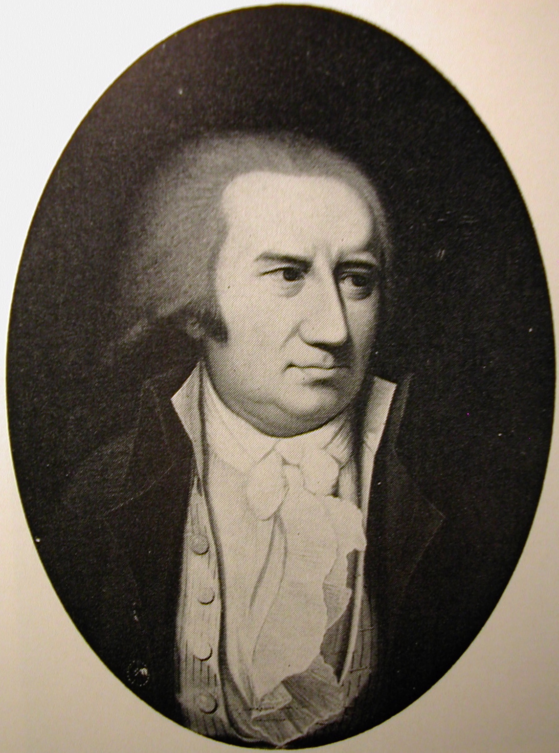 Kammerherre Bernt Anker (1746–1805).